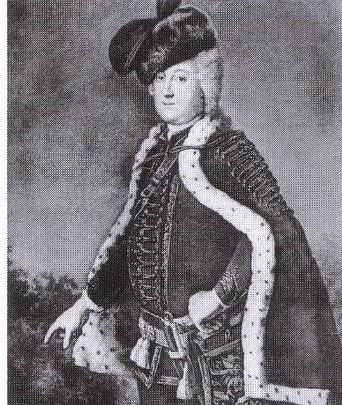 Dietrich von Anhalt-Dessau